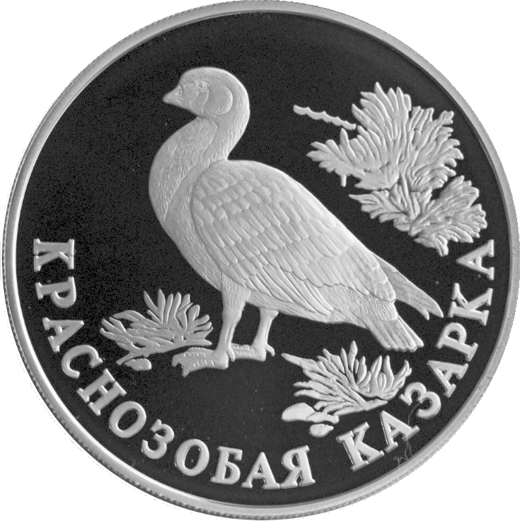 Серия: «Красная книга», Краснозобая казарка, 1 рубль, реверс.